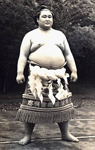 第38代横綱 照國万蔵